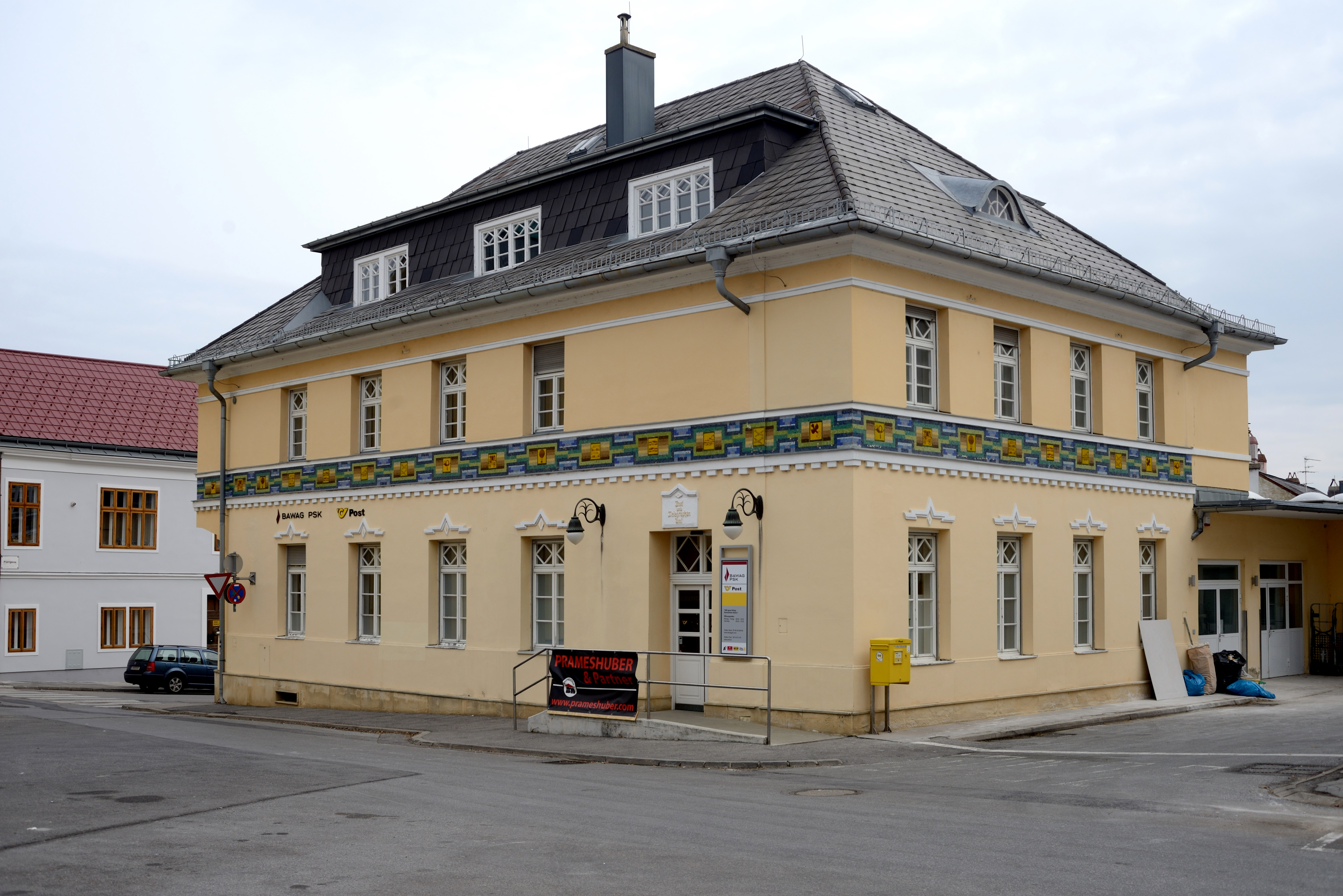 Städtisches Postamt (PLZ 7000) von Eisenstadt. Ignaz-Phillip-Semmelweis-Gasse 7